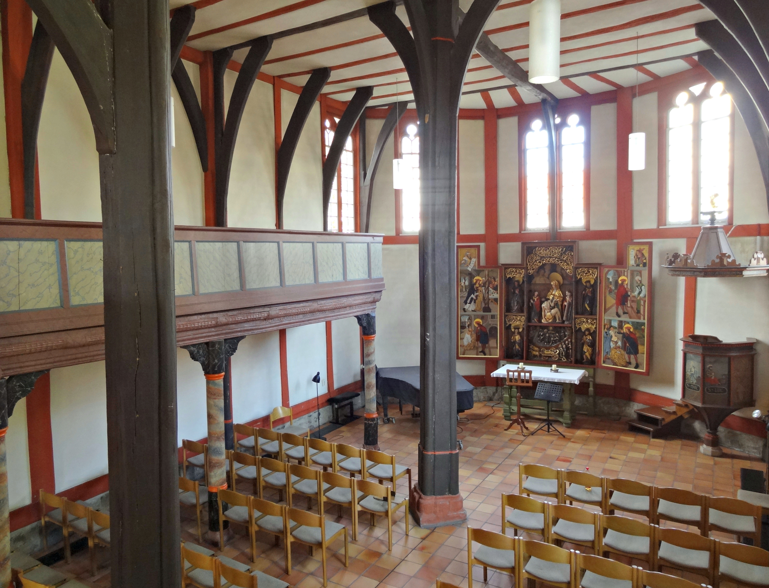 Ehemalige Hospitalkapelle St. Wendelin (Butzbach)